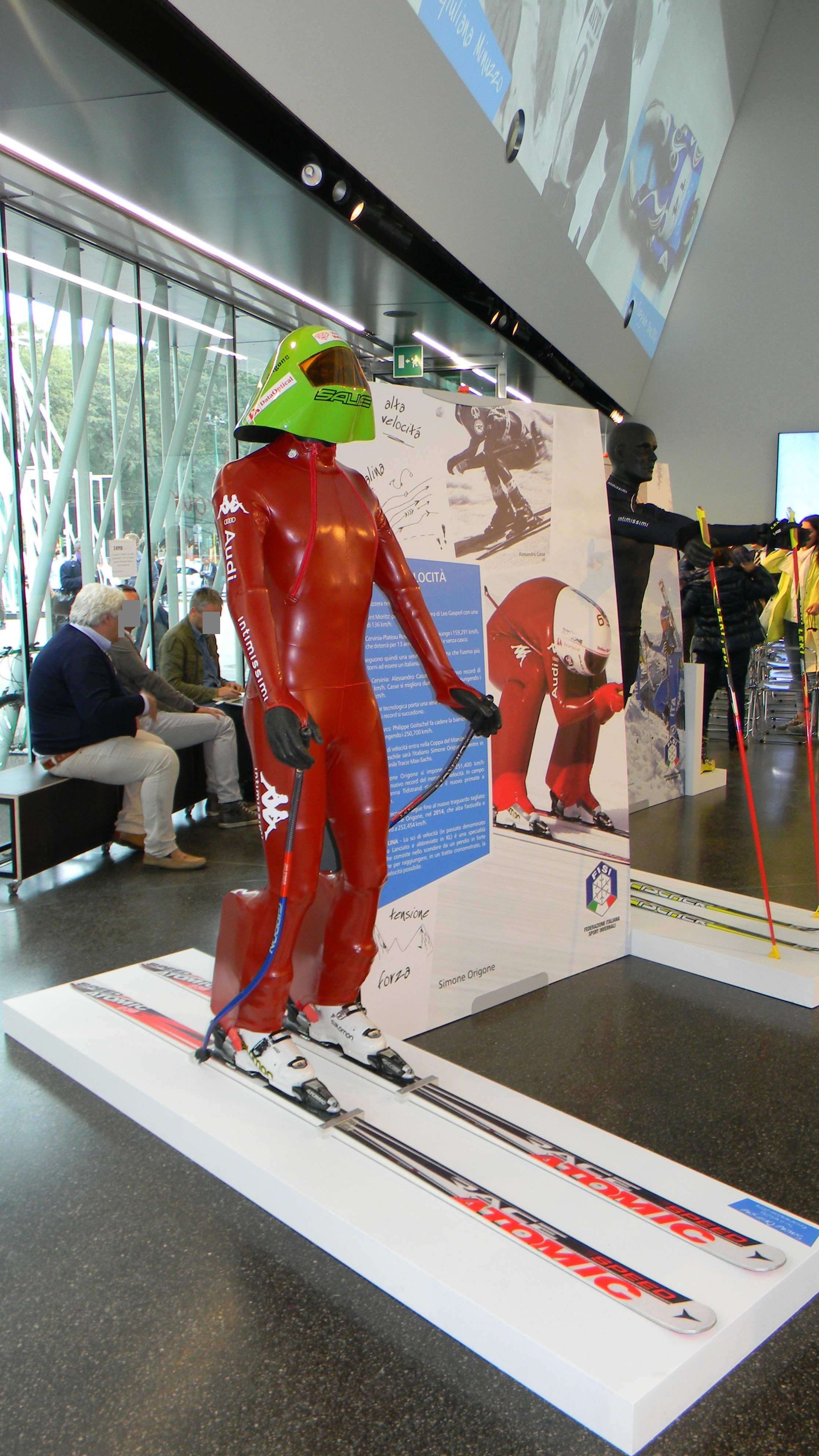 L'attrezzatura da sci di velocità (chilometro lanciato) utilizzata da Simone Origone per conquistare il record mondiale di velocità su sci, a Vars nel 2014.